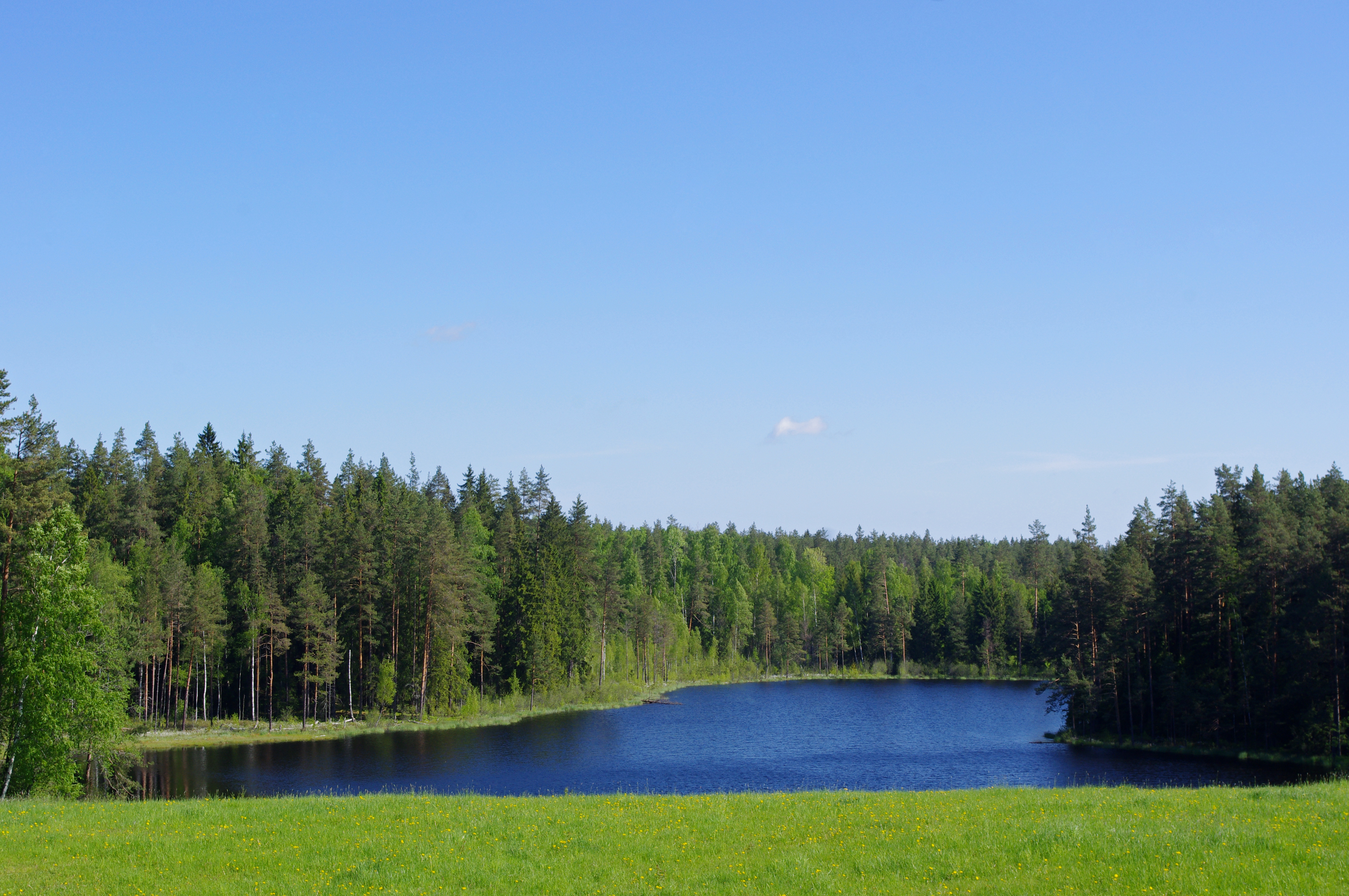 Laanemetsa Savijärv